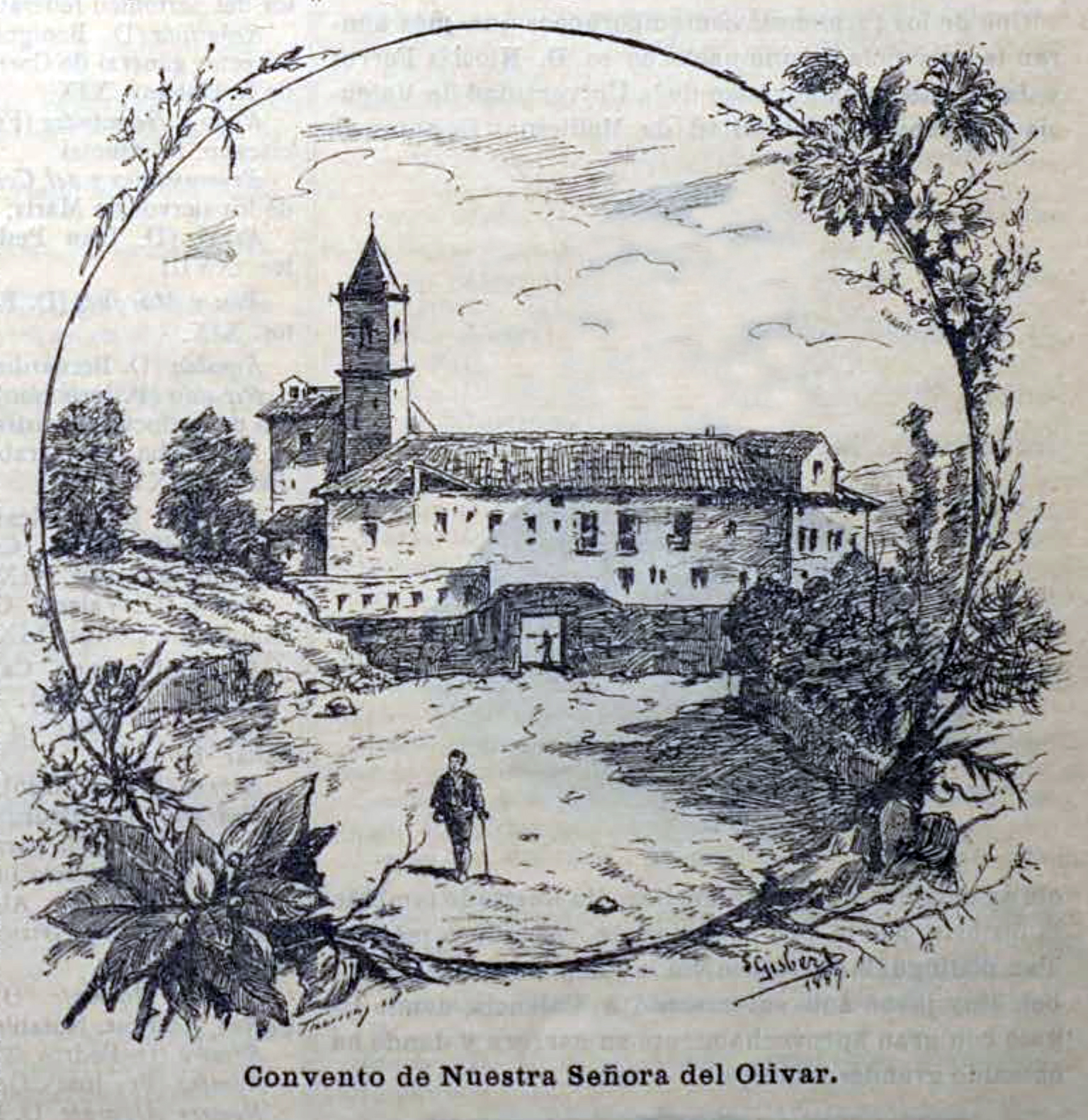 Convento de Nuestra Señora del Olivar.